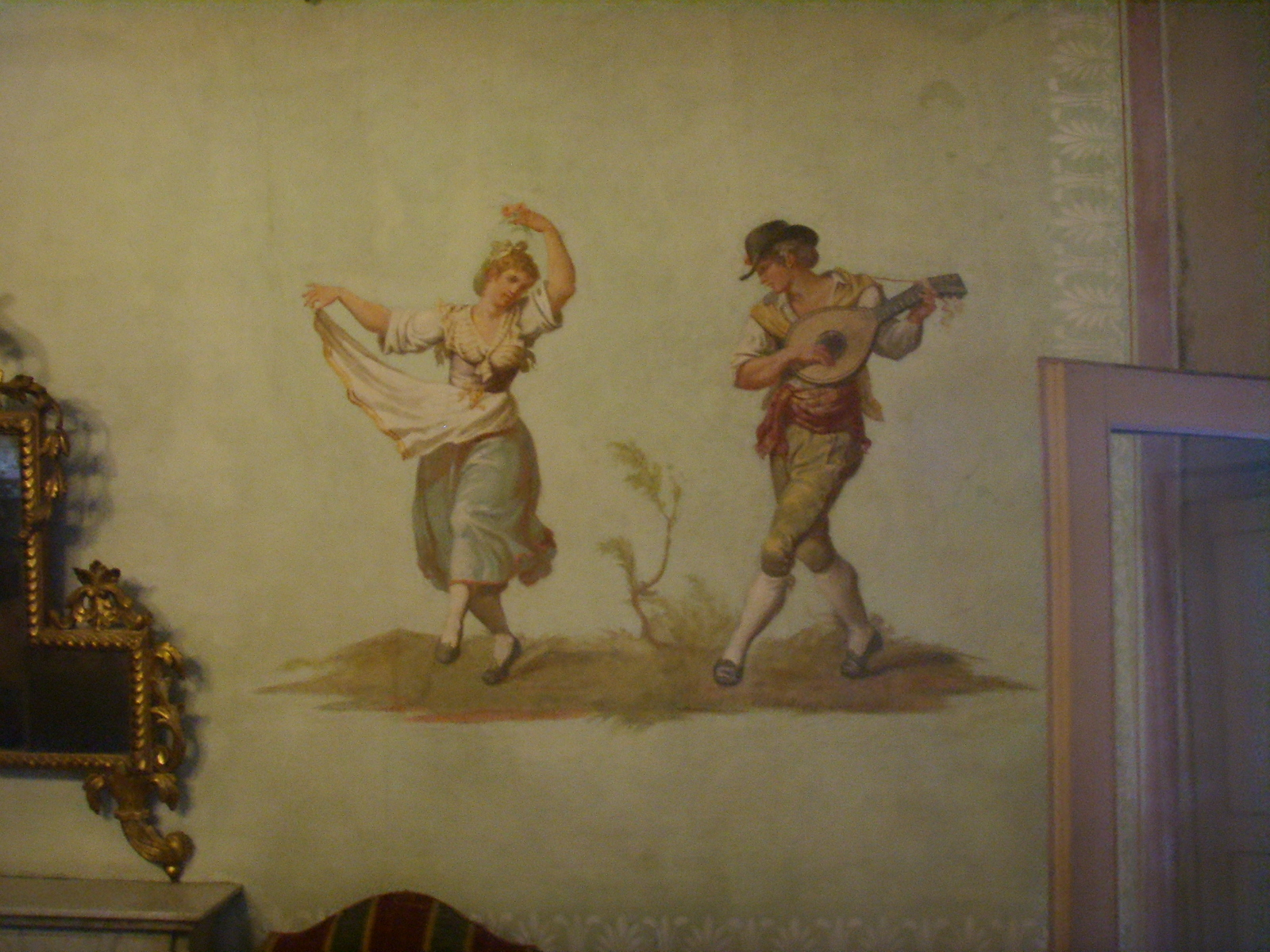 Villa villoresi di sesto, affreschi di Bartolomeo Pinelli